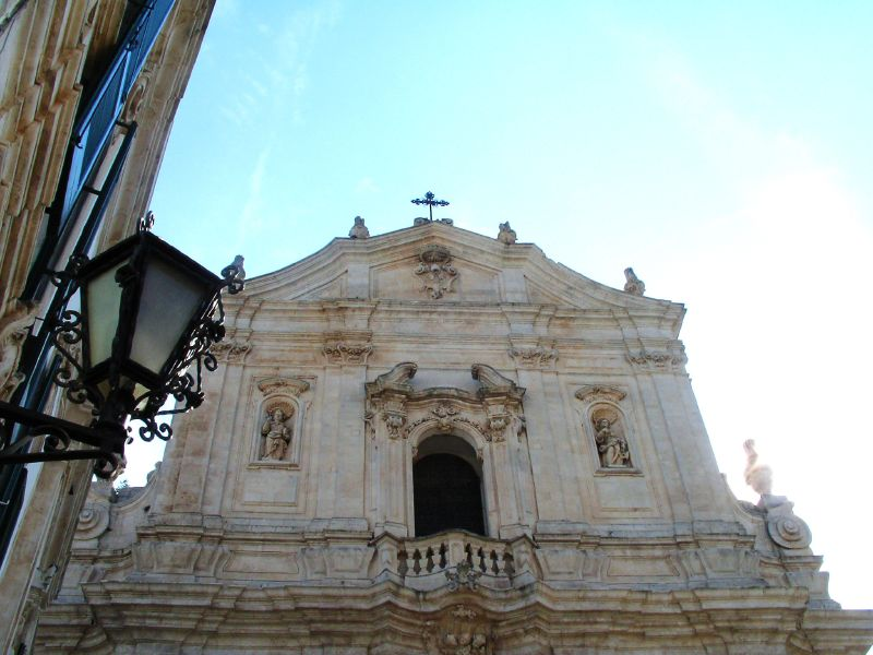 Basilica di San Martino - Martina Franca